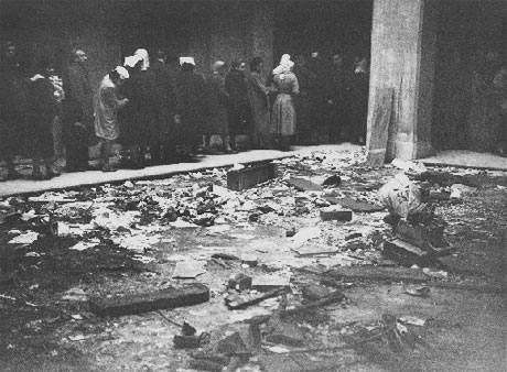 Patio del edificio de la Curia en Buenos Aires incendiada por los seguidores de Juan Perón en 1955.